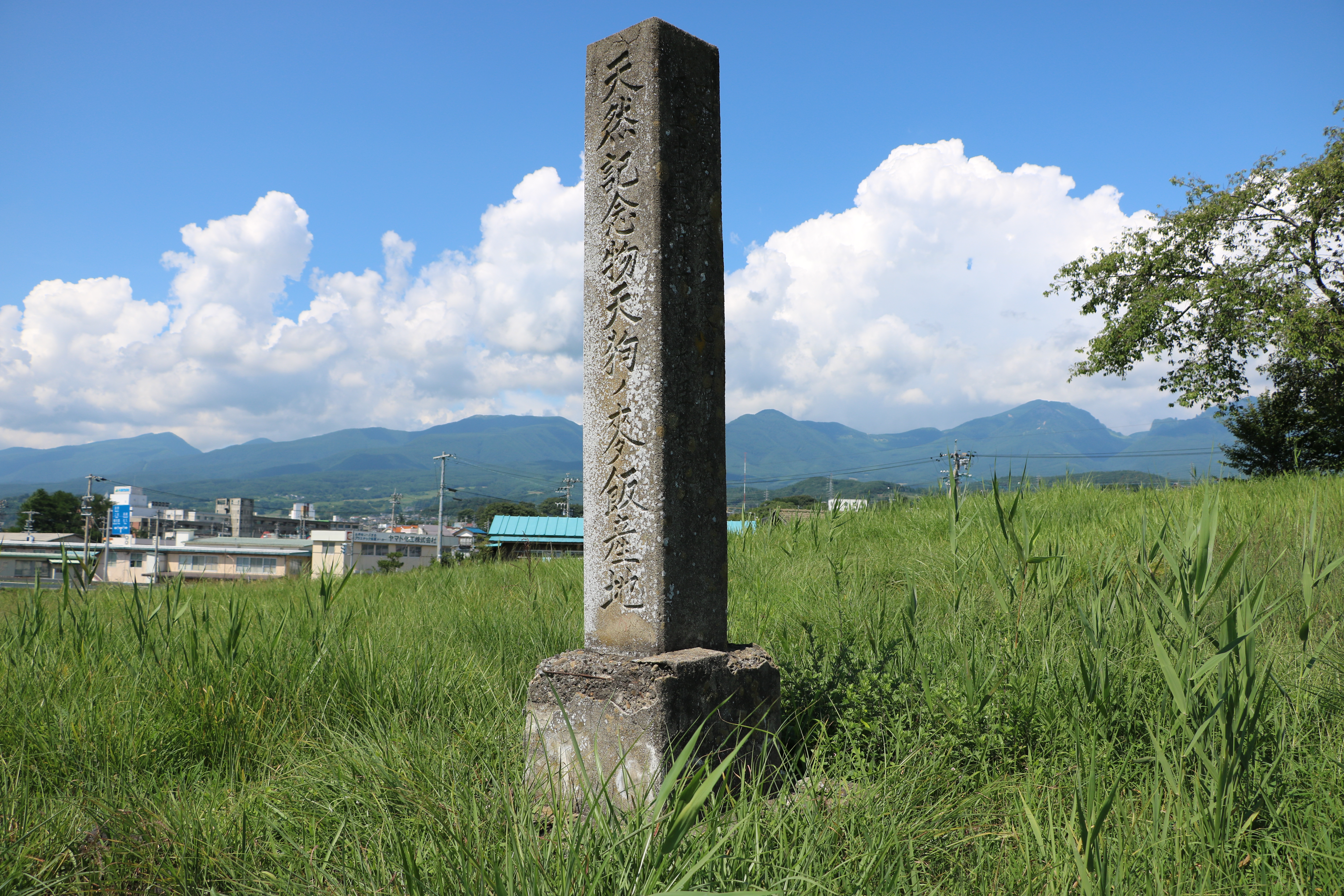 国指定天然記念物テングノムギメシ産地の石碑（長野県小諸市）